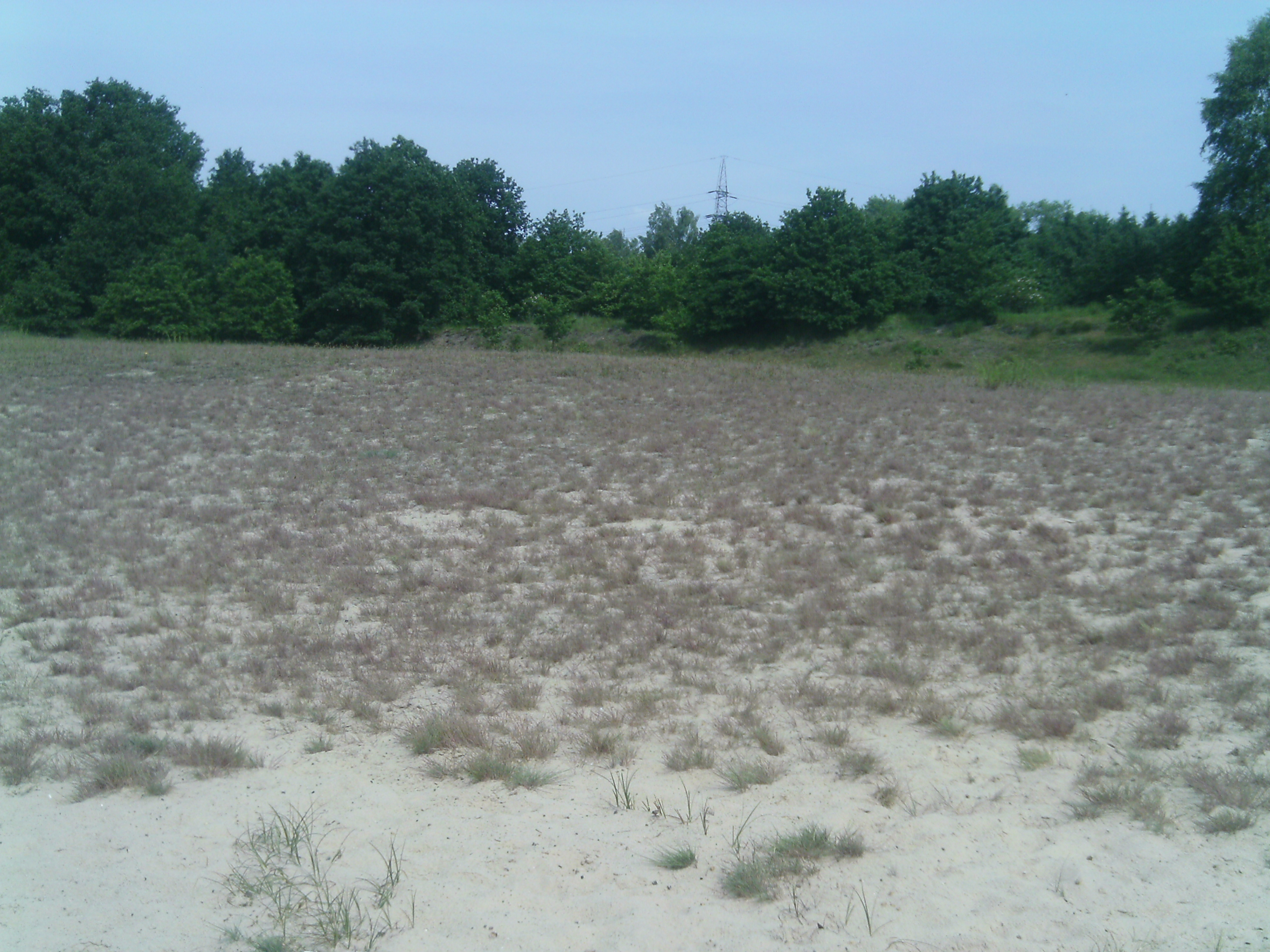 Eine Silbergrasflur (Corynephorus canescens) im Naturschutzgebiet „Sandtrockenrasen Achim“